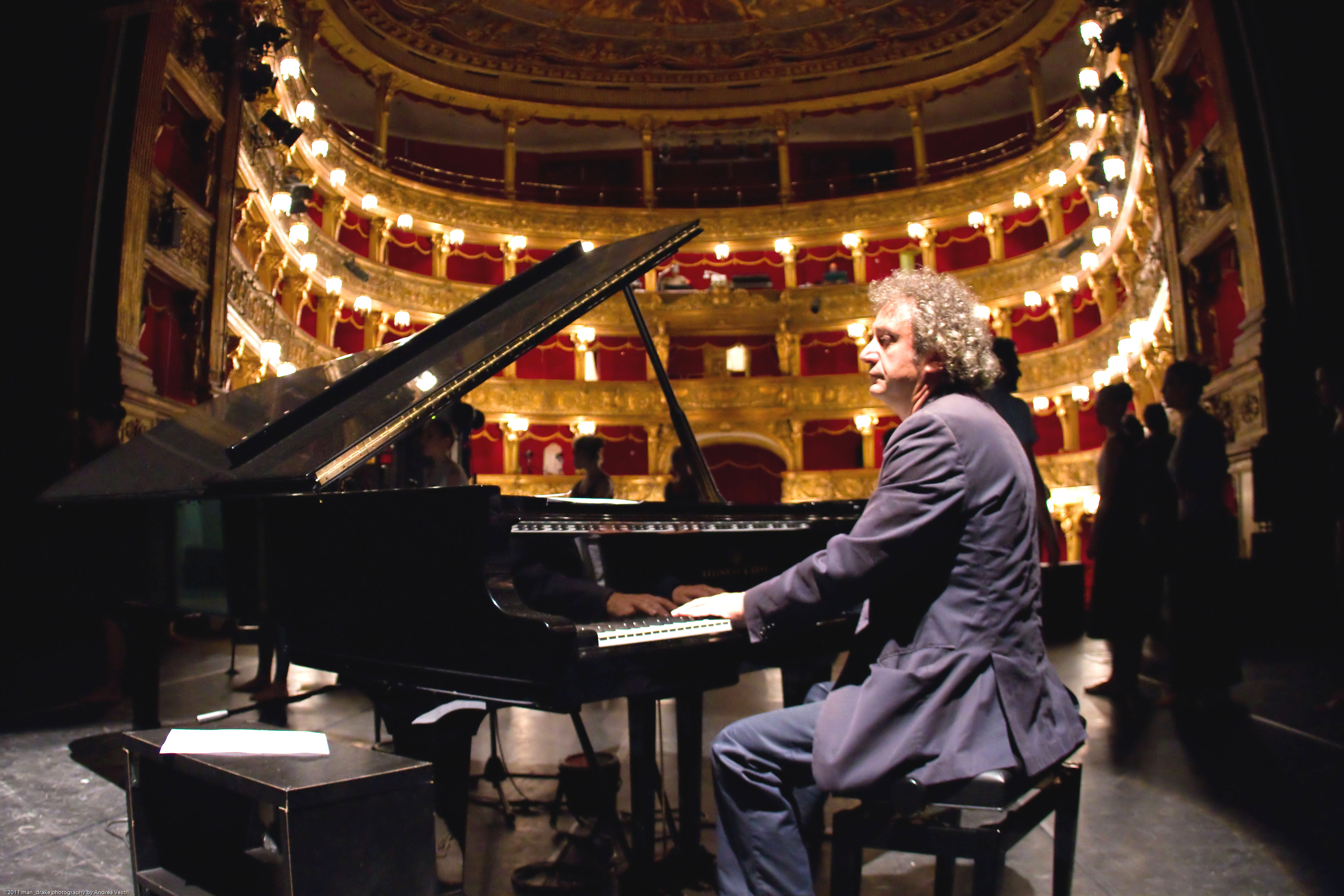 Maestro Roberto Cacciapaglia